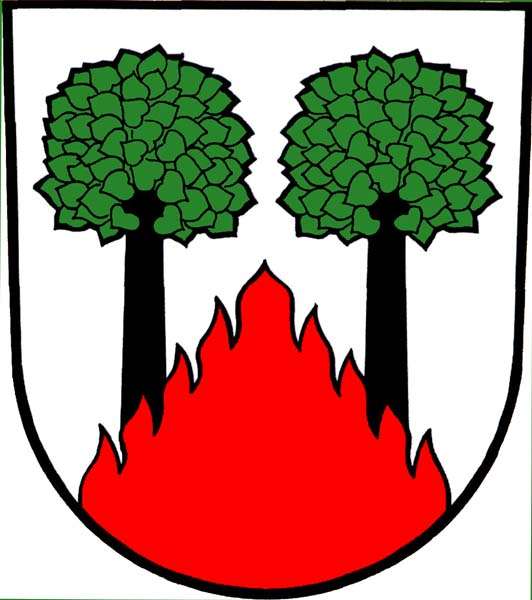 Znak obce Veselý Žďár